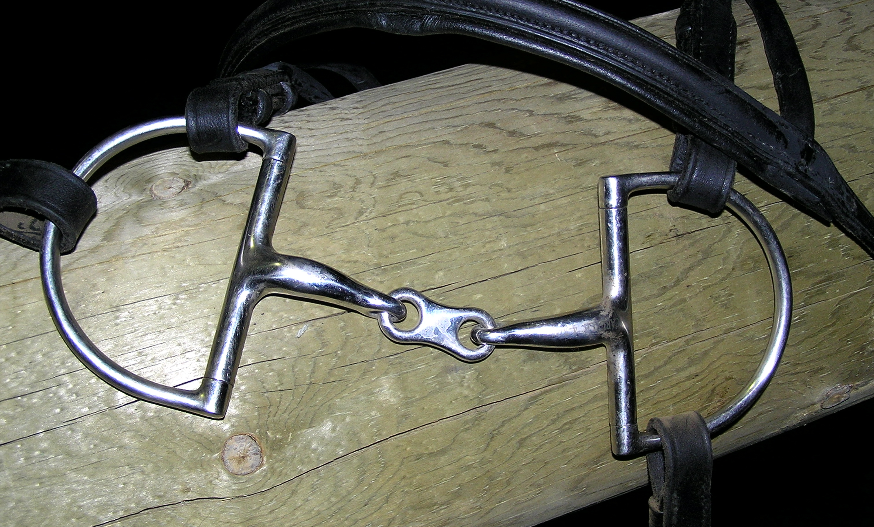 French Link Snaffle Bit